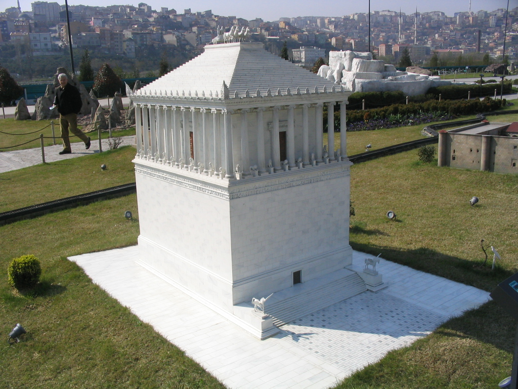 Pravděpodobná podoba Mausolea v Halikarnassu, Miniatürk park, Istanbul, Turecko